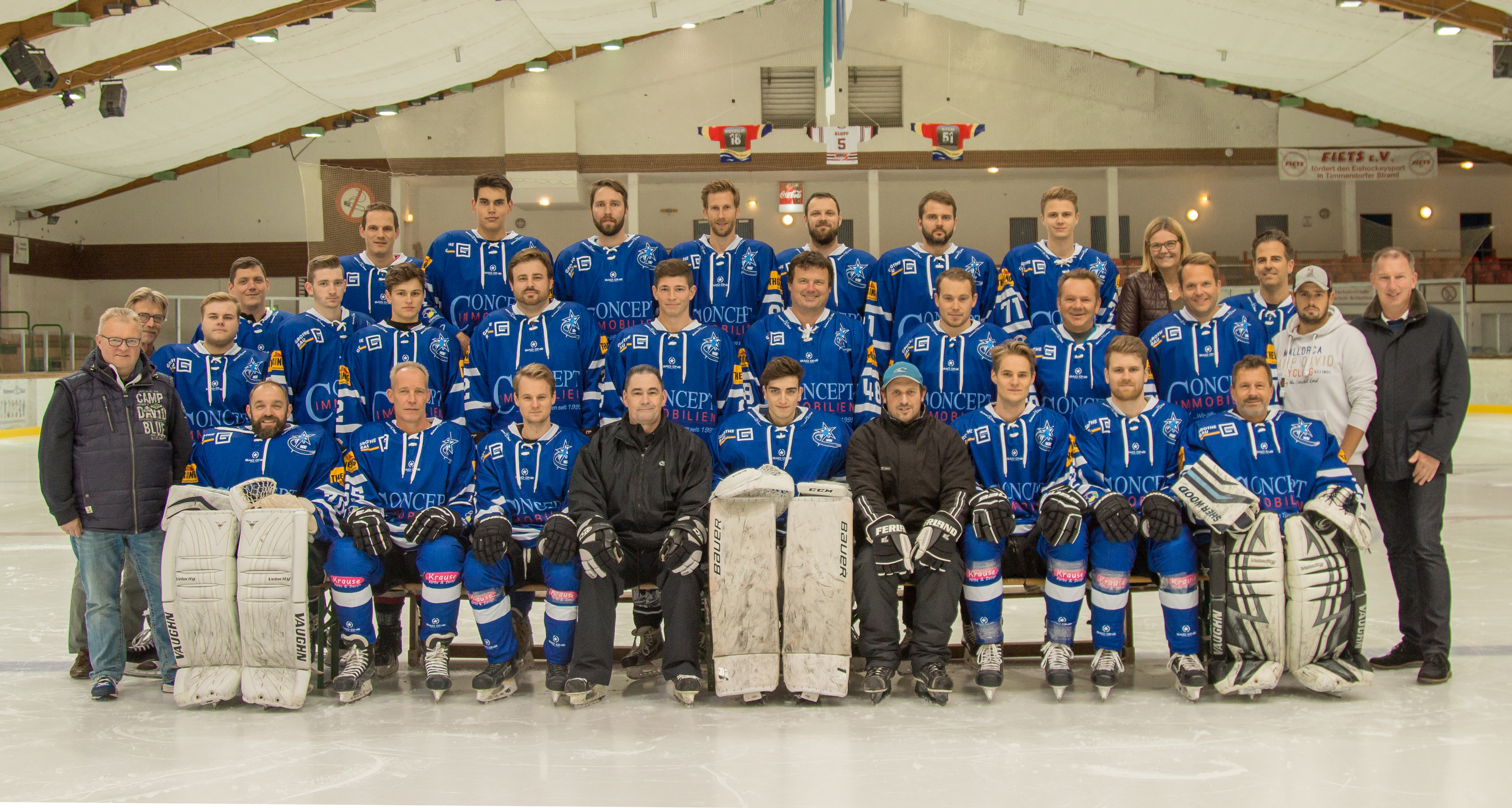 Die erste Mannschaft der neuen Vereinsgeschichte des CE Timmendorfer Strand 2018/19